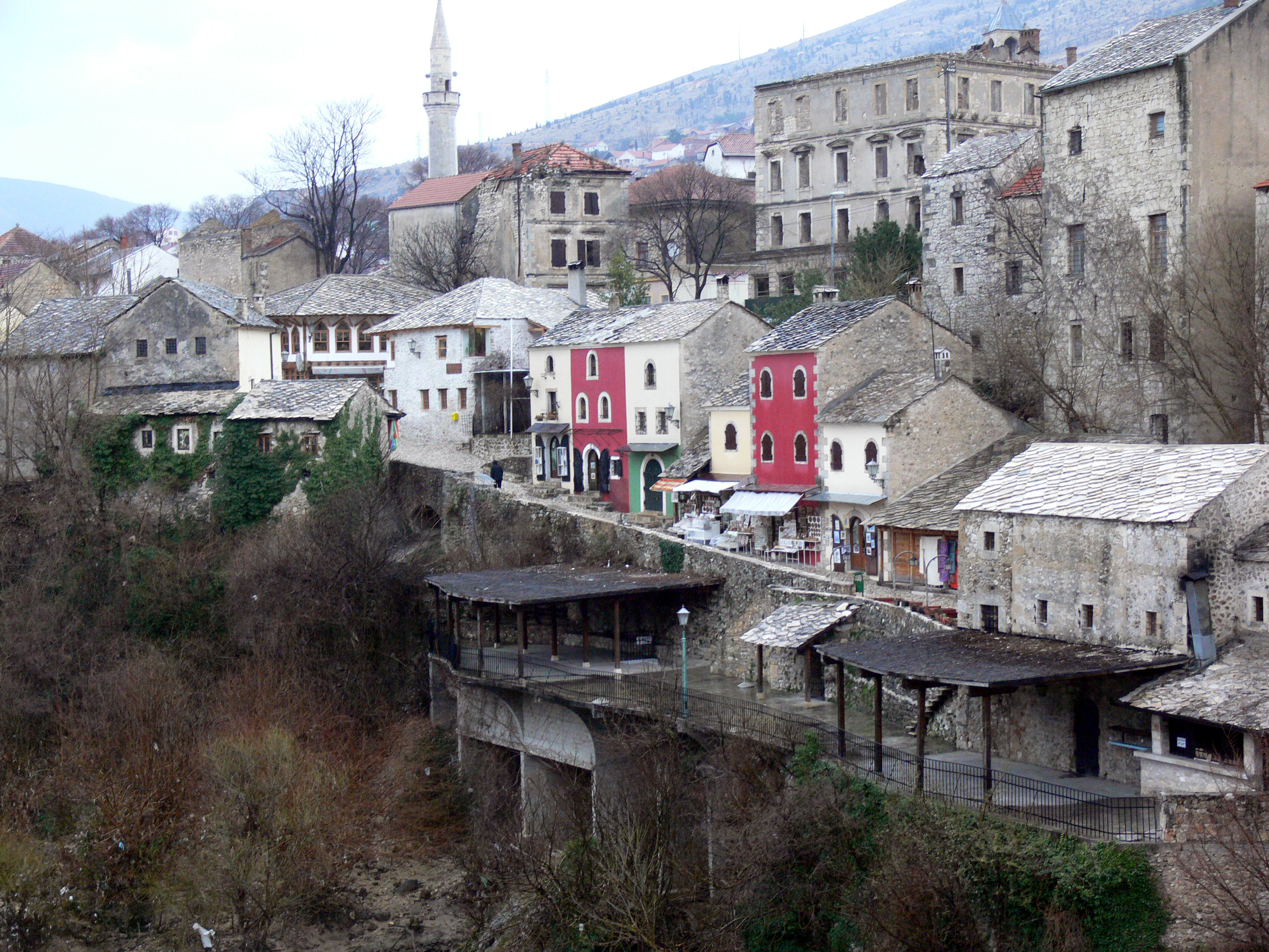 Mostar.